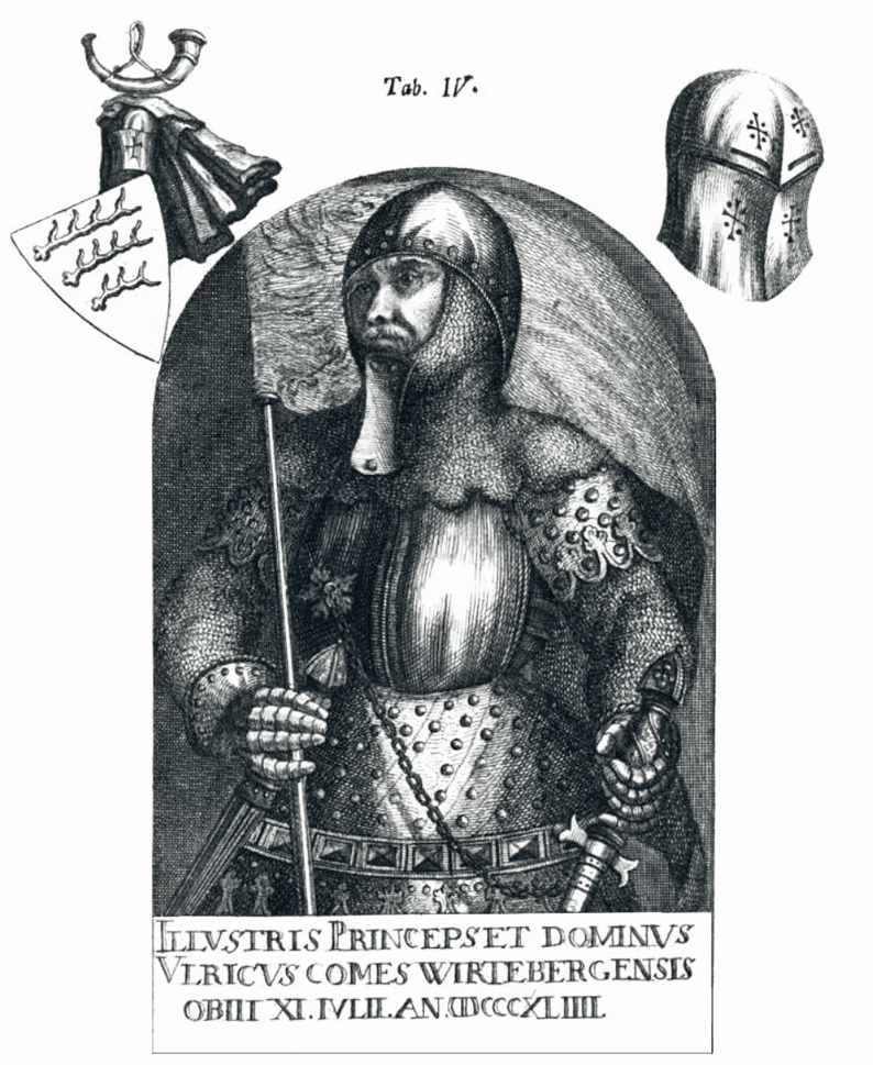 Graf Ulrich III. von Württemberg mit Reichssturmfahne (Kupferstich)